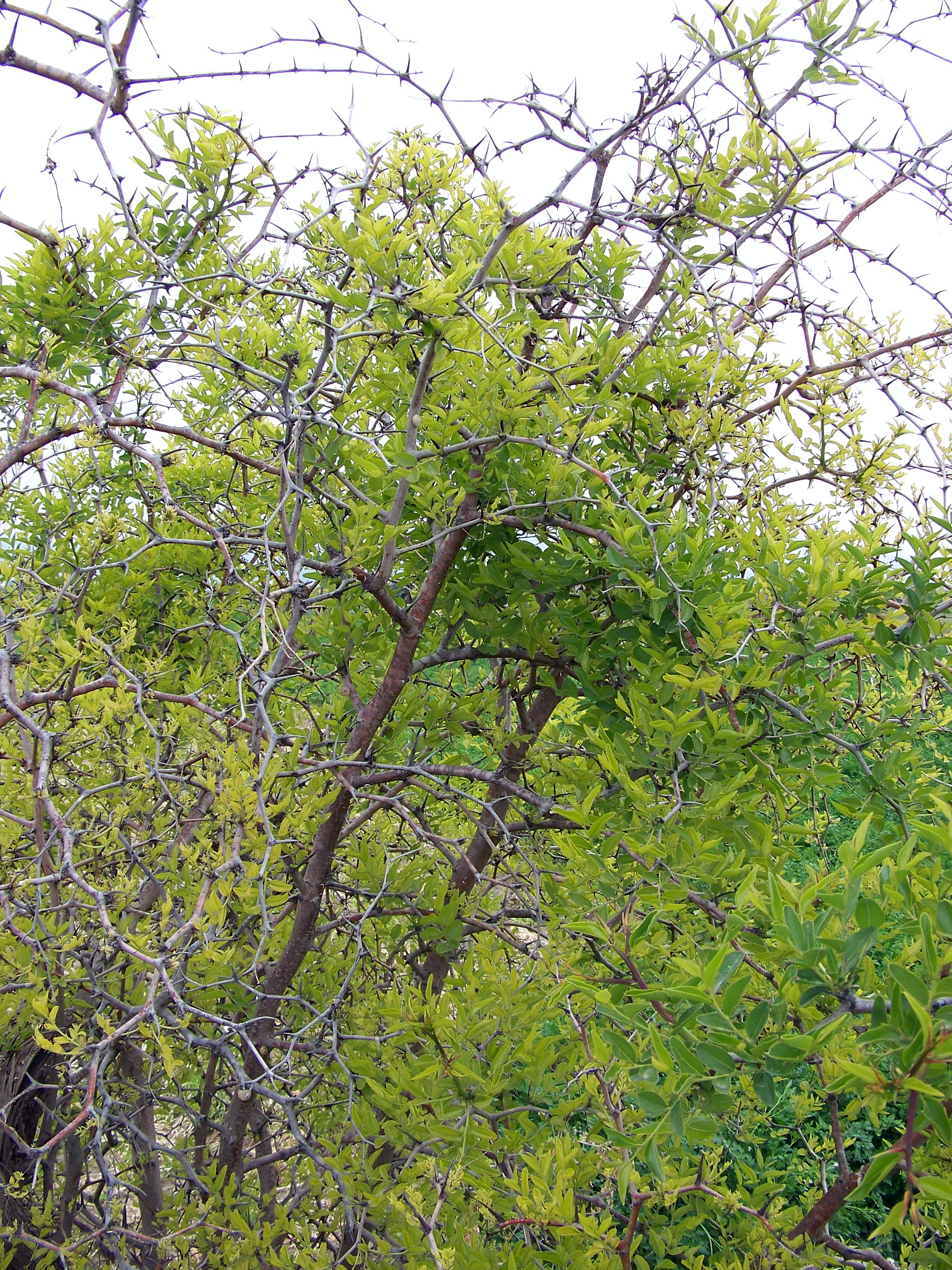 Ziziphus jujuba (Jinjolero, azufaifo) - Vista de conjunto. - Cultivado, circa de Lo Gil, Albatera (Provincia de Alicante, España).